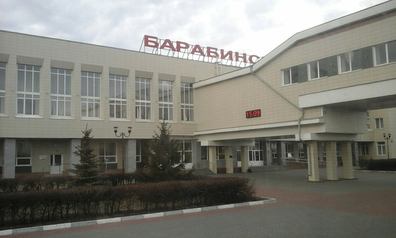 Станция Барабинск 18 апреля 2015 года.